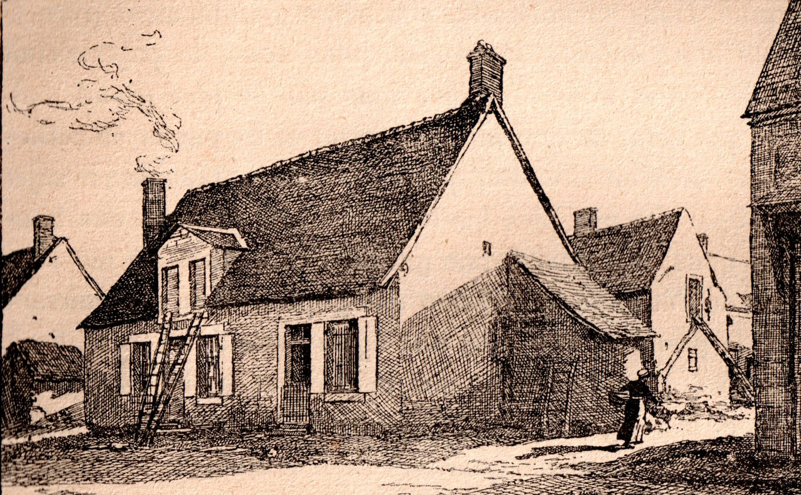 Maison natale du missionnaire François Coillard à Asnières les Bourges. Source : Edouard Favre, François Coillard, Enfance et jeunesse, Société des Missions Evangéliques, Paris, 1908.